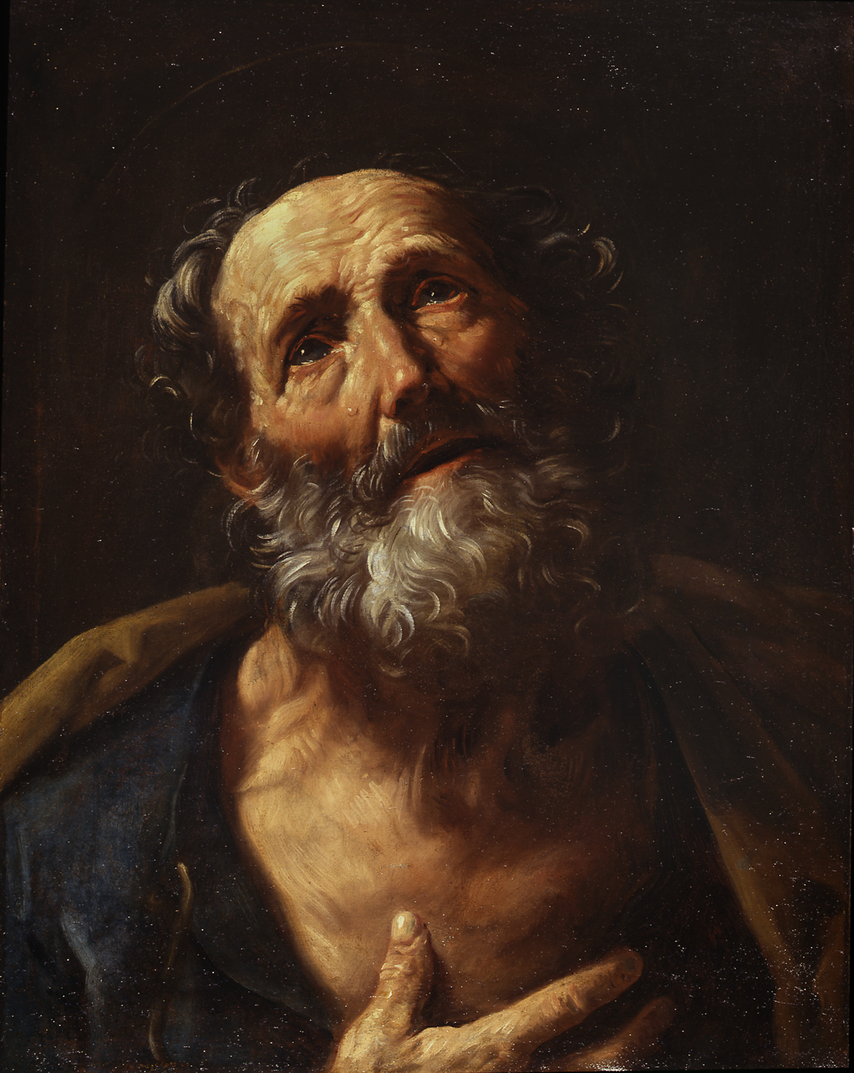 San Pietro penitente. Olio su tela. 62,5 x 48 cm. Collezione Mainetti (Roma)